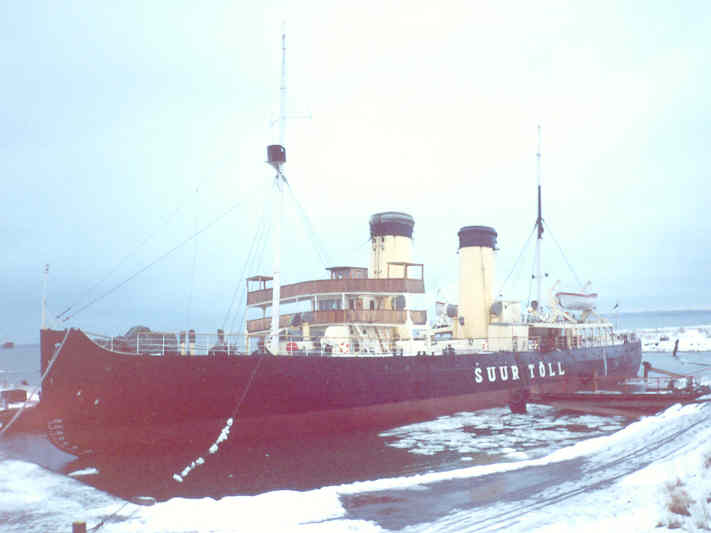 Suur Tõll. Pildistatud Linnahalli taga